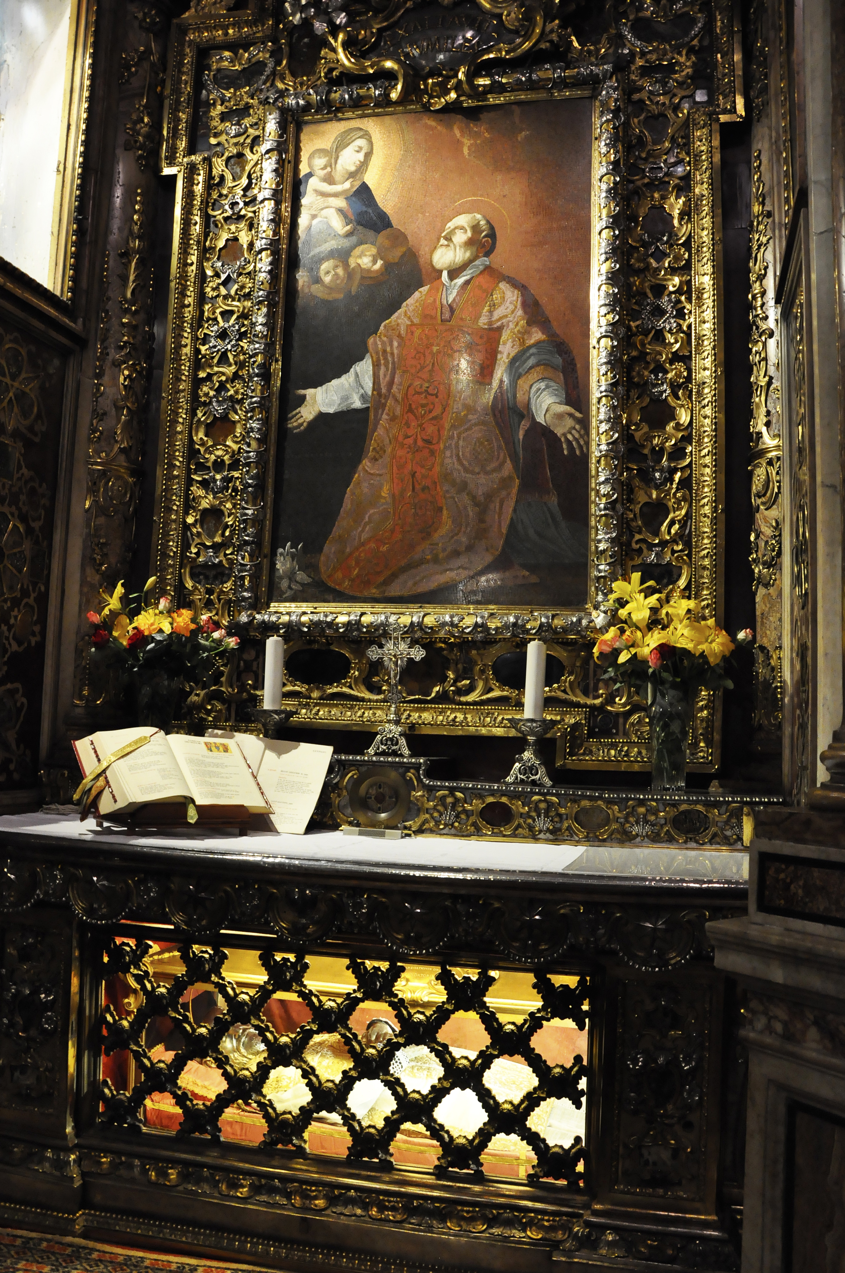 Het graf van Filippus Neri in de Chiesa Nuova te Rome met een kopie in mozaïek van de schilderij De maagd verschijnt aan Filippus Neri van Guido Reni